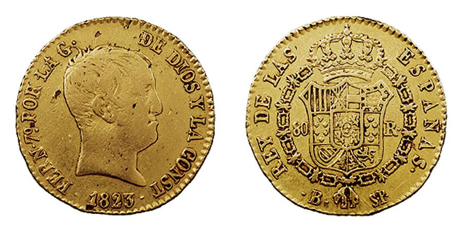 Moneda de vuitenta rals encunyada en 1823 al regnat de Ferran VII d'Espanya. És una peça d'or fabricada a Barcelona.